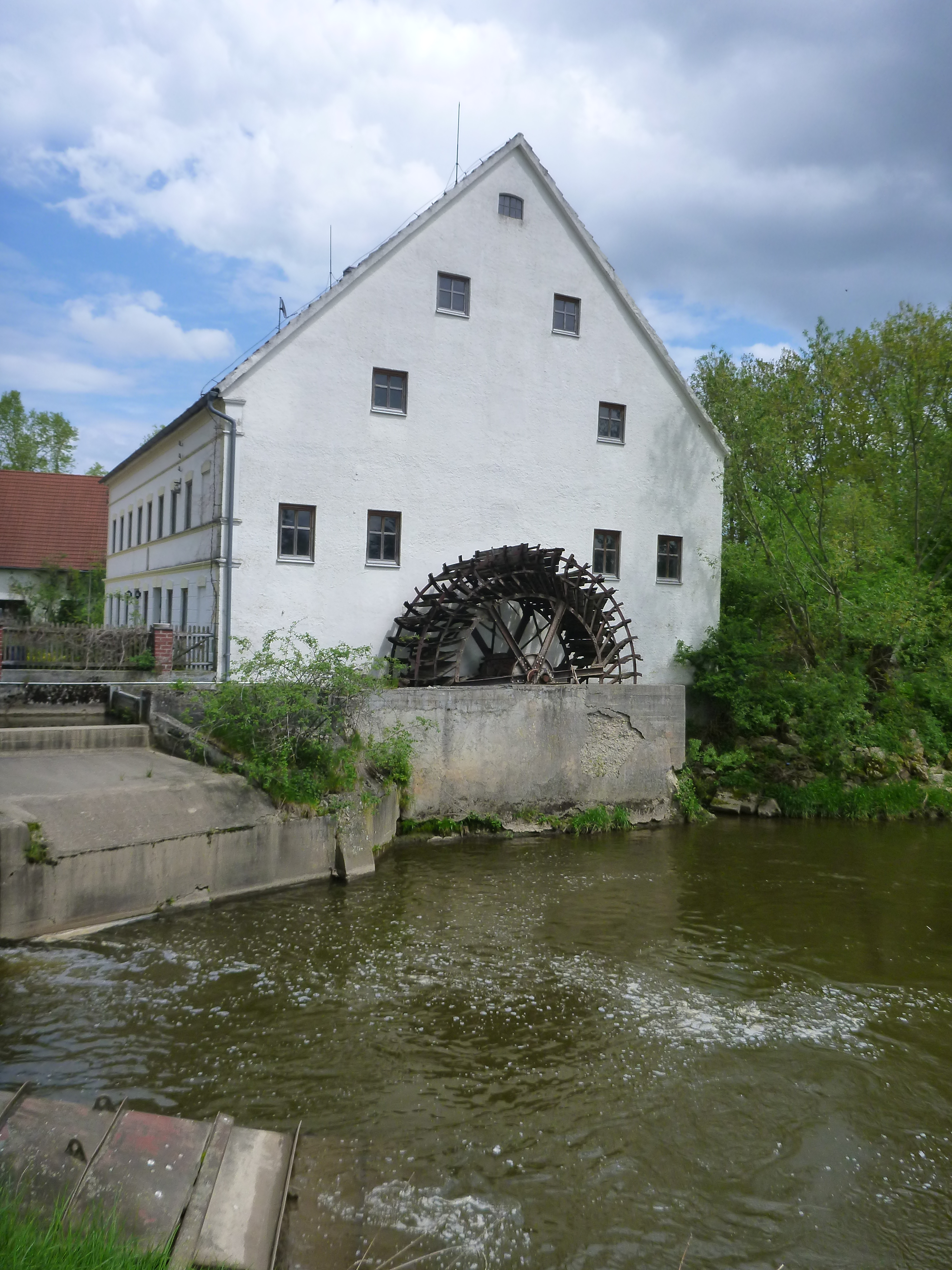 Mühlrad